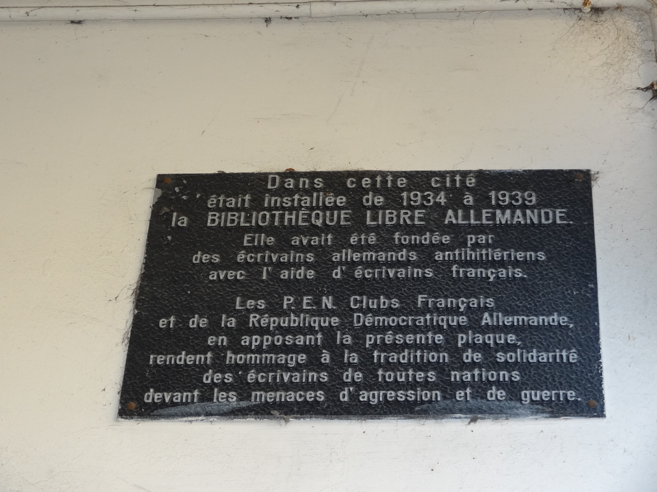 Paris 13e arrondissement - Cité fleurie (65 boulevard Arago) - plaque rappelant l'existence de la "Bibliothèque libre allemande" de 1934 à 1939